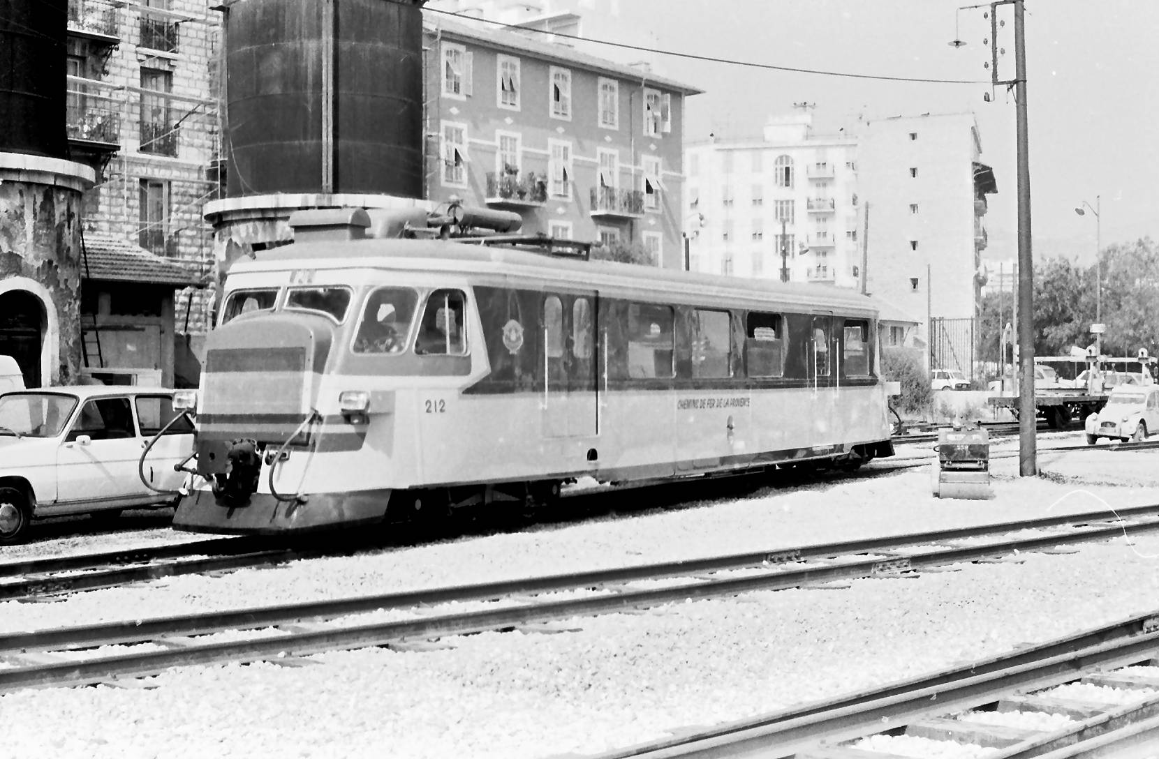 Autorail Billard N° 212 des Chemins de fer de Provence (voie métrique) dans l'avant gare de Nice ("Gare du Sud") en juillet 1983